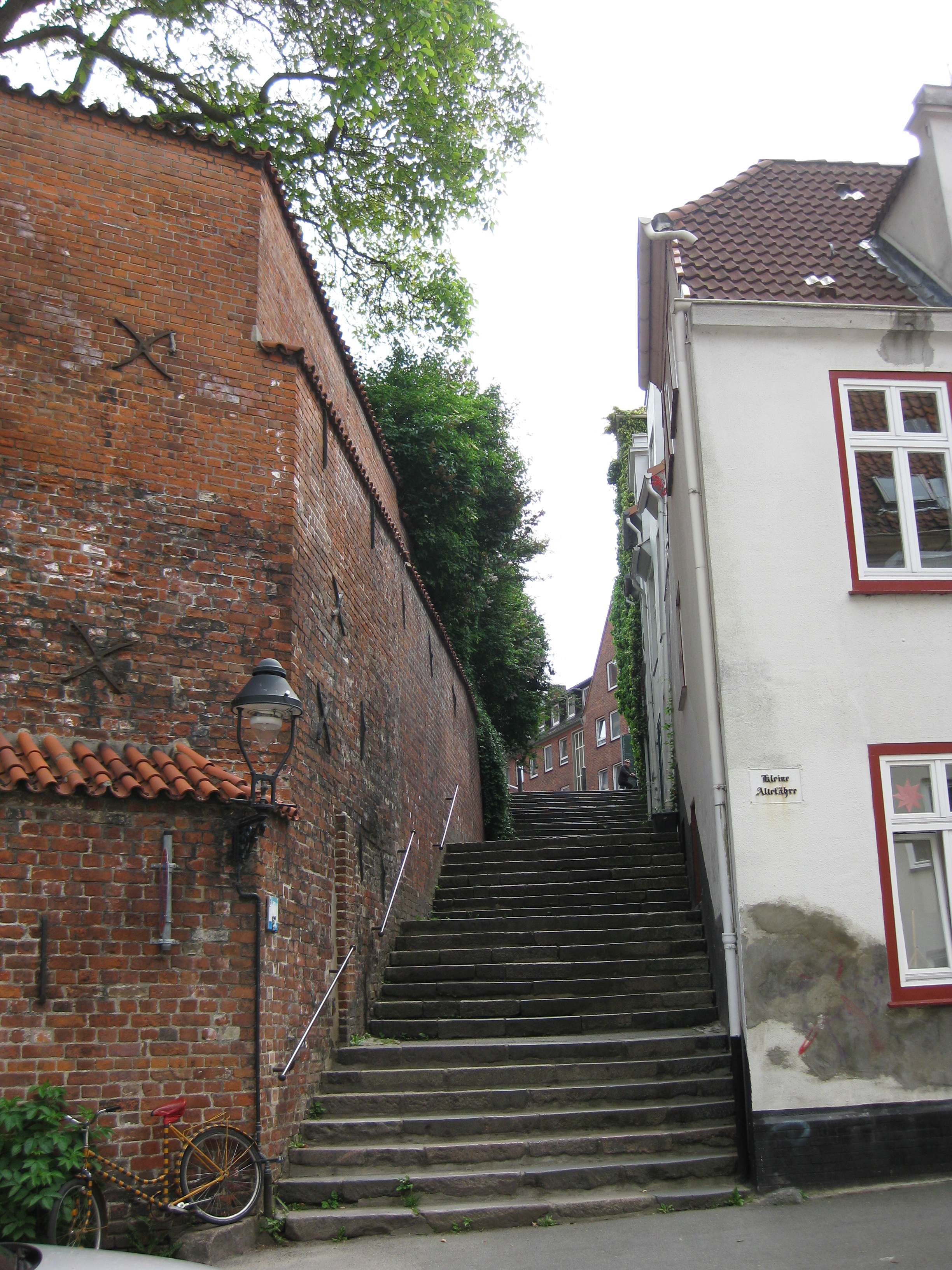 Burgtreppe bei Burgkloster in Lübeck.